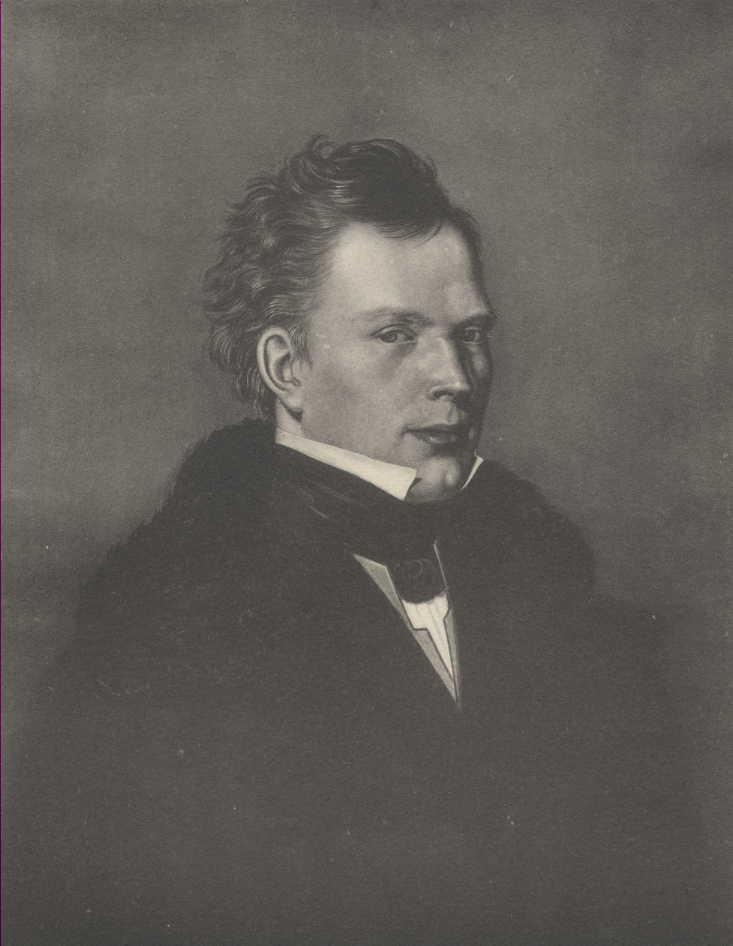 Bildnis Philipp Magnus Seifert, ab 1829 Professor für Medizin in Greifswald